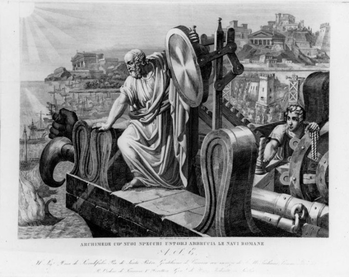 Disegno antico raffigurante Archimede e gli specchi ustori